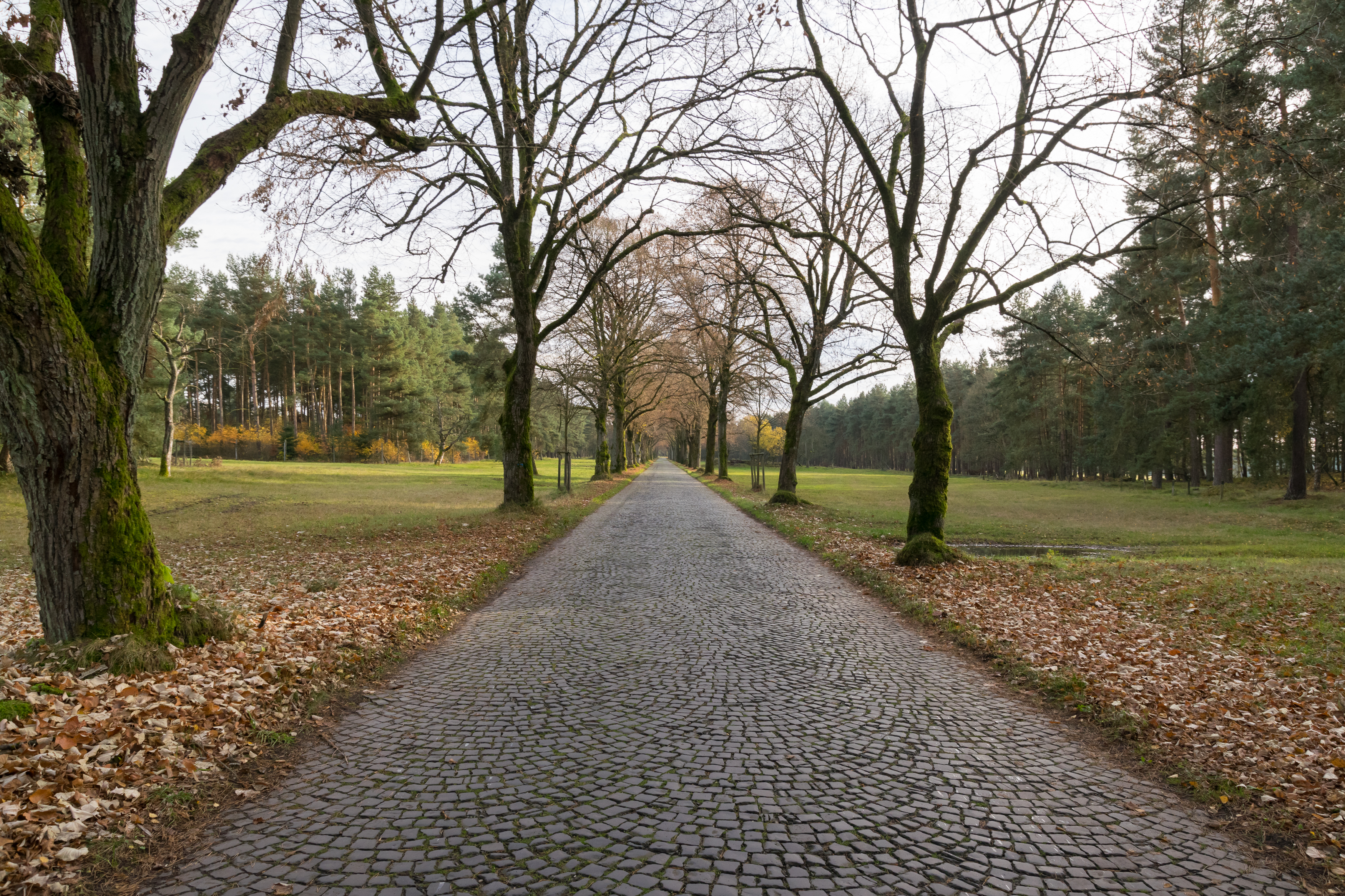 Haustenbecker Straße durch die Senne im November, Bereich Schlangen-Oesterholz-Haustenbeck